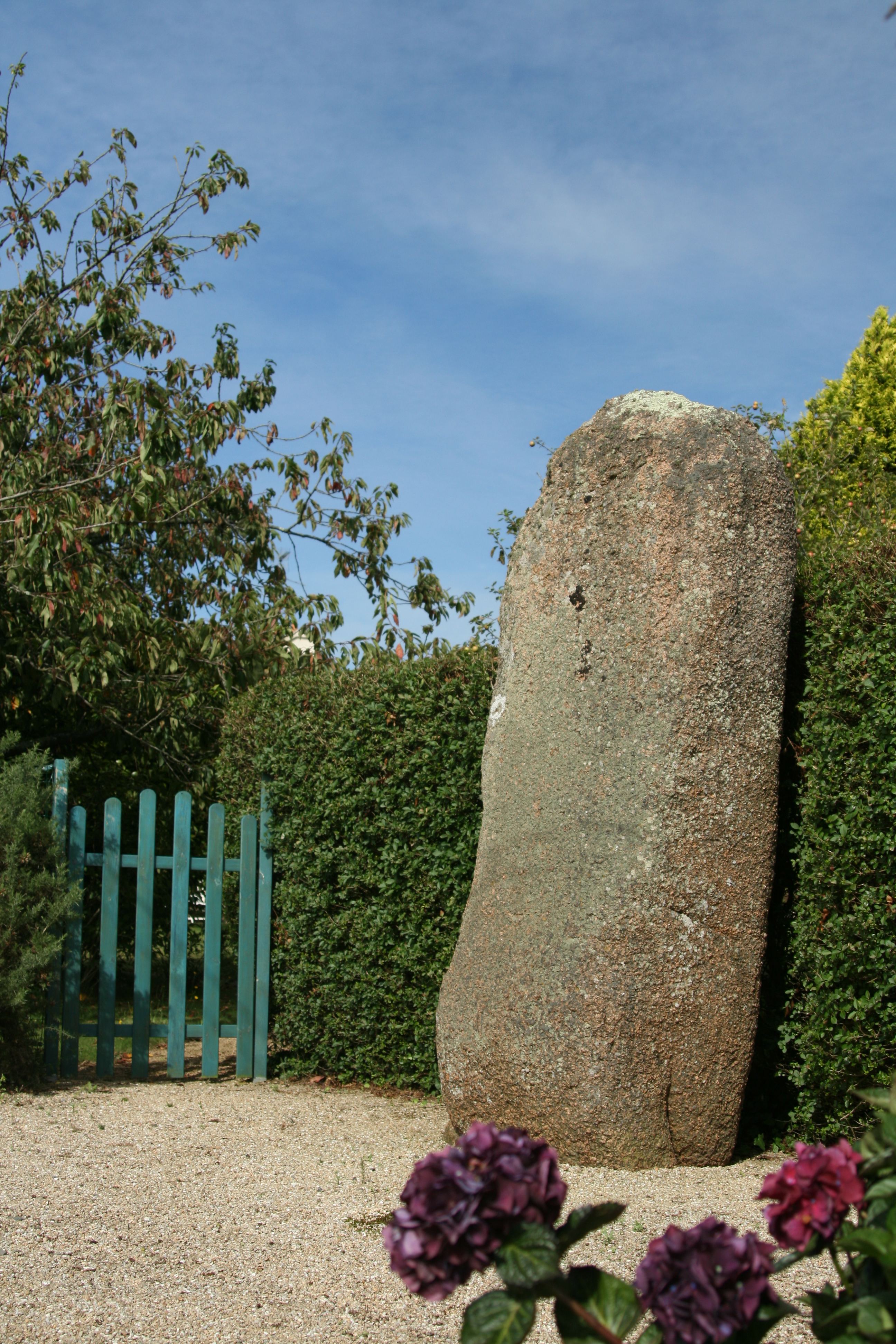 Ce menhir se trouve à l'entrée du bourg de Trégastel, Côtes d'Armor